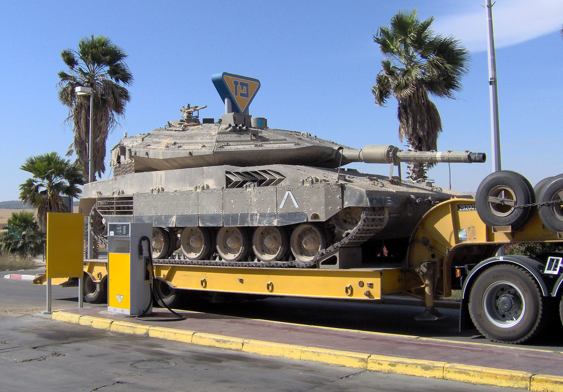 Merkava Mk4 tank